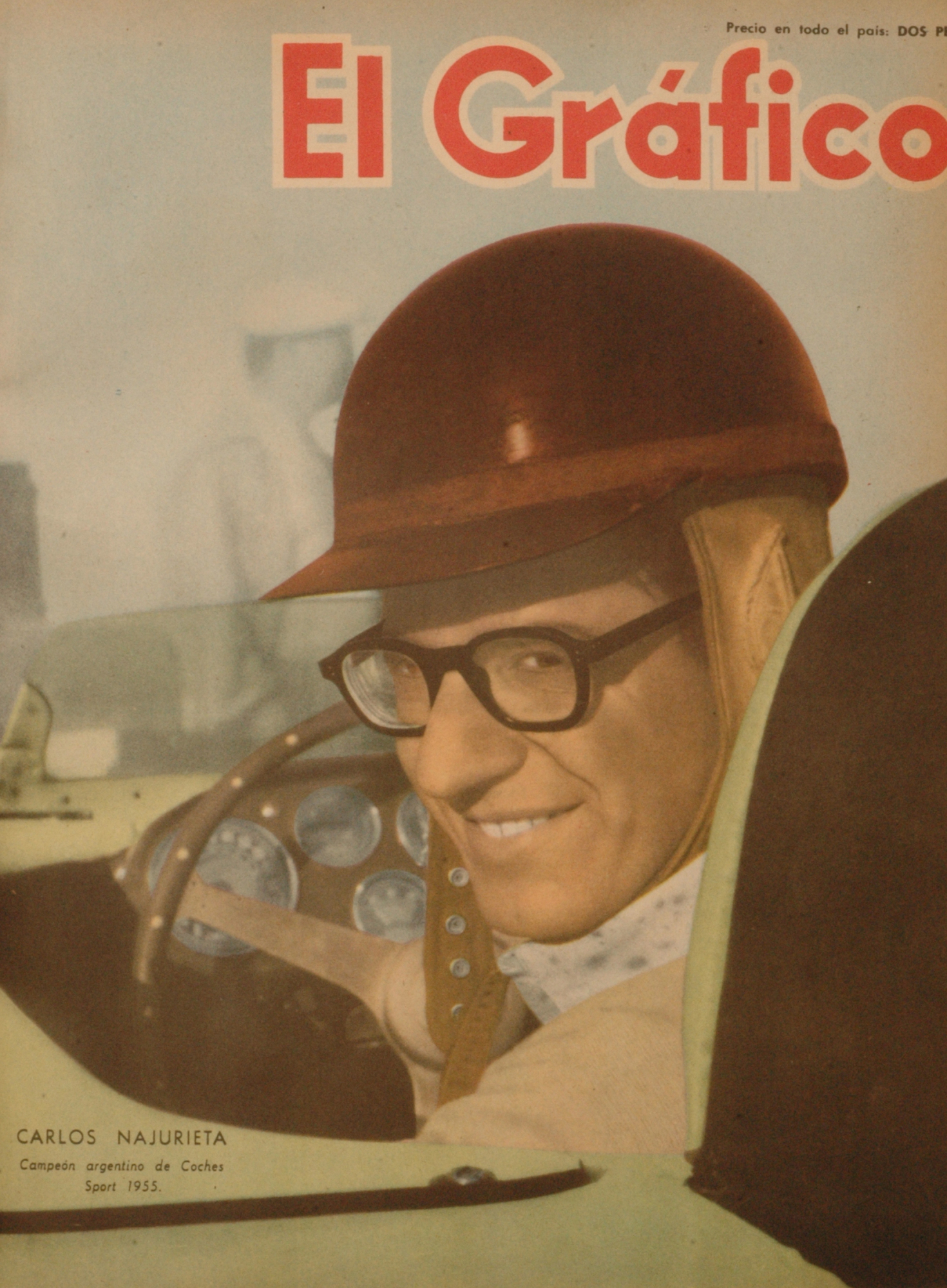 El Grafico del 16 de Marzo de 1956. Edicion 1908